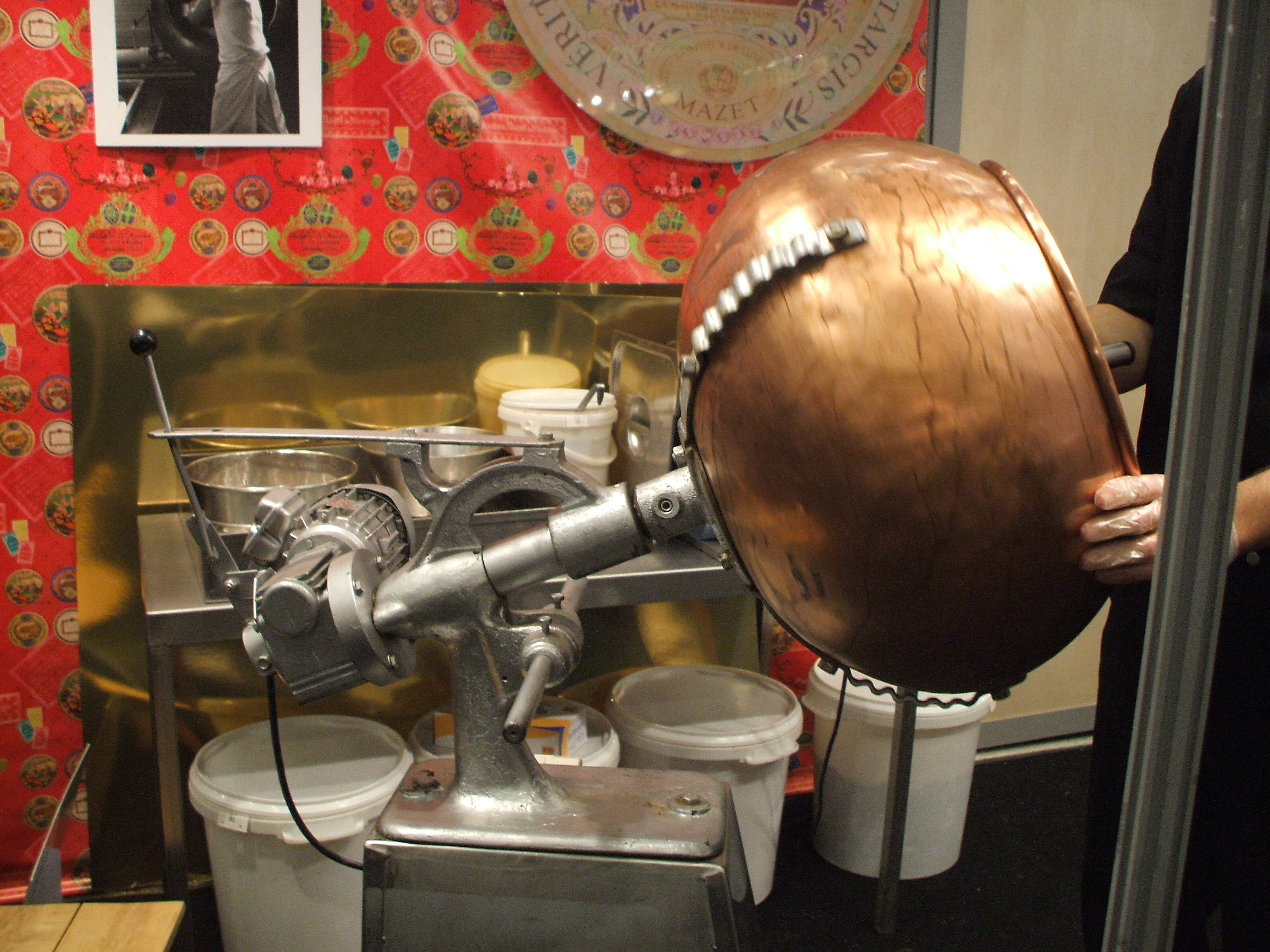 turbine à chocolat, qui sert à enrober les pralines ou les amandes un peu comme des dragées.